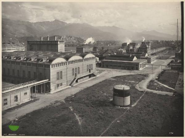 Veduta panoramica dello stabilimento Azoto nel 1955 situato in Avenza, Carrara.